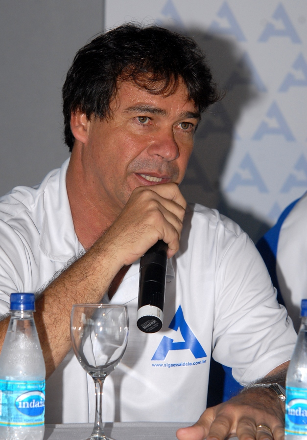 Paulo Vítor Barbosa de Carvalho